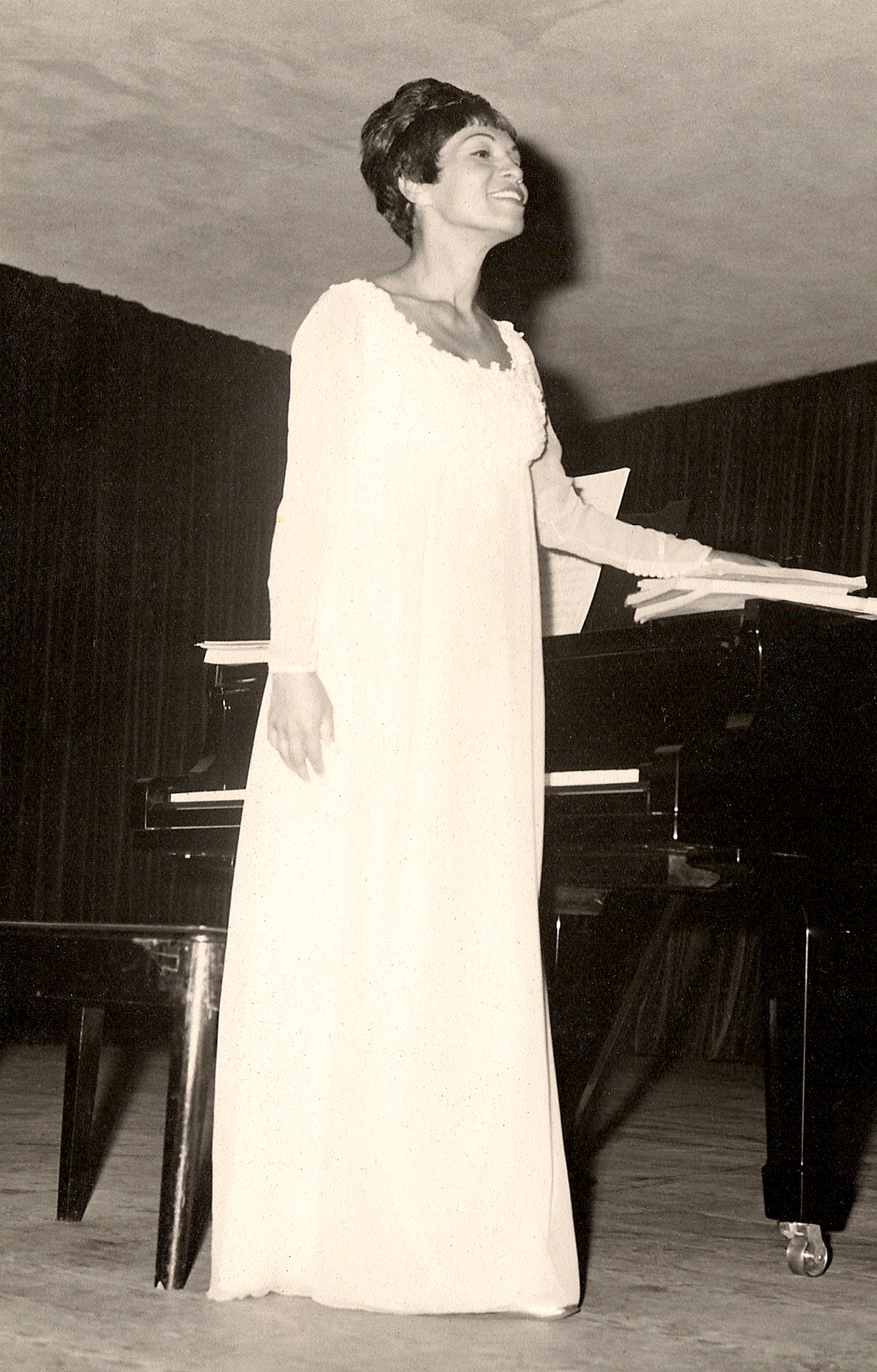 Aida Navarro ofreció múltiples recitales en reconocidas salas de Venezuela.